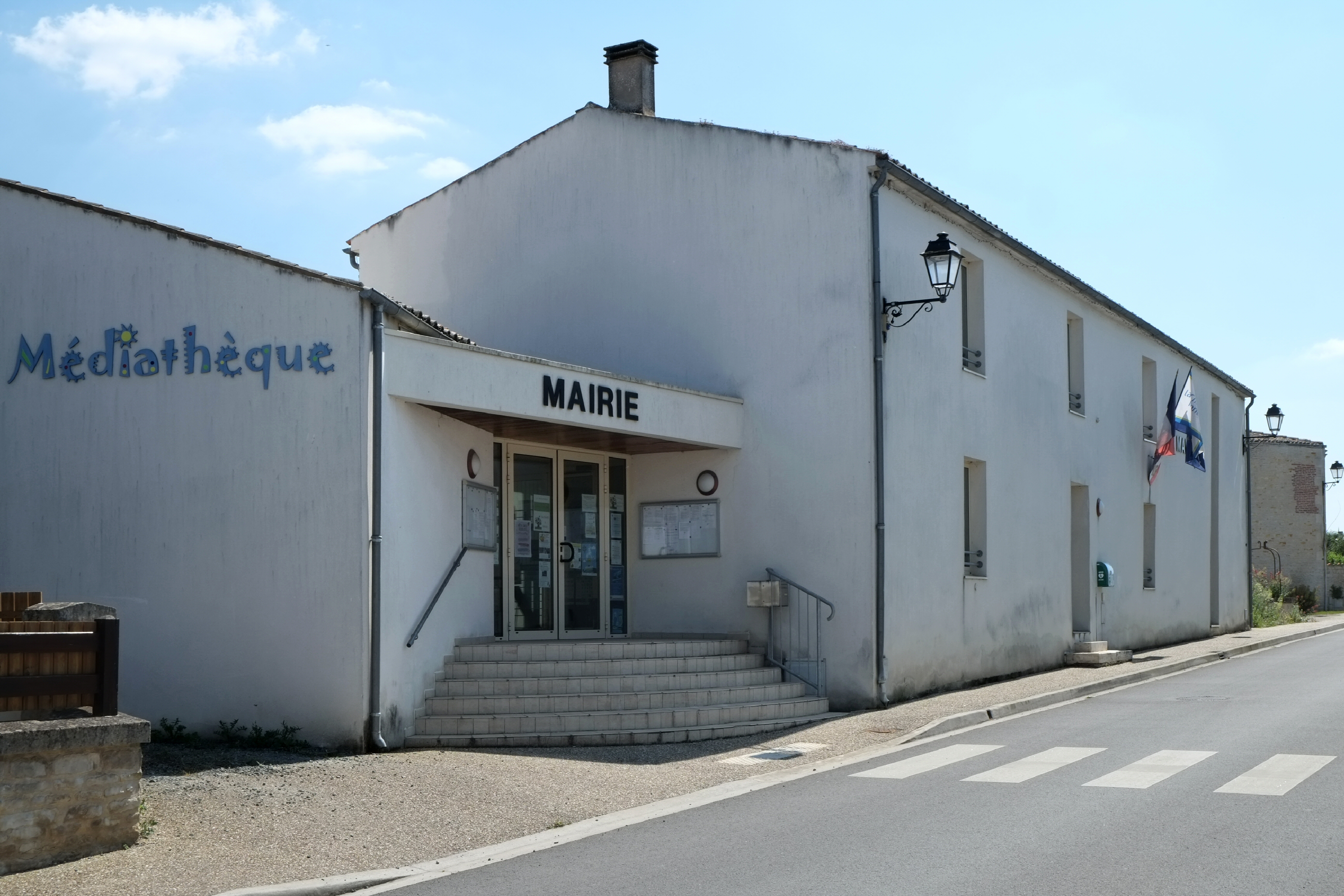 Mairie La-Grève-sur-Mignon Charente-Maritime France